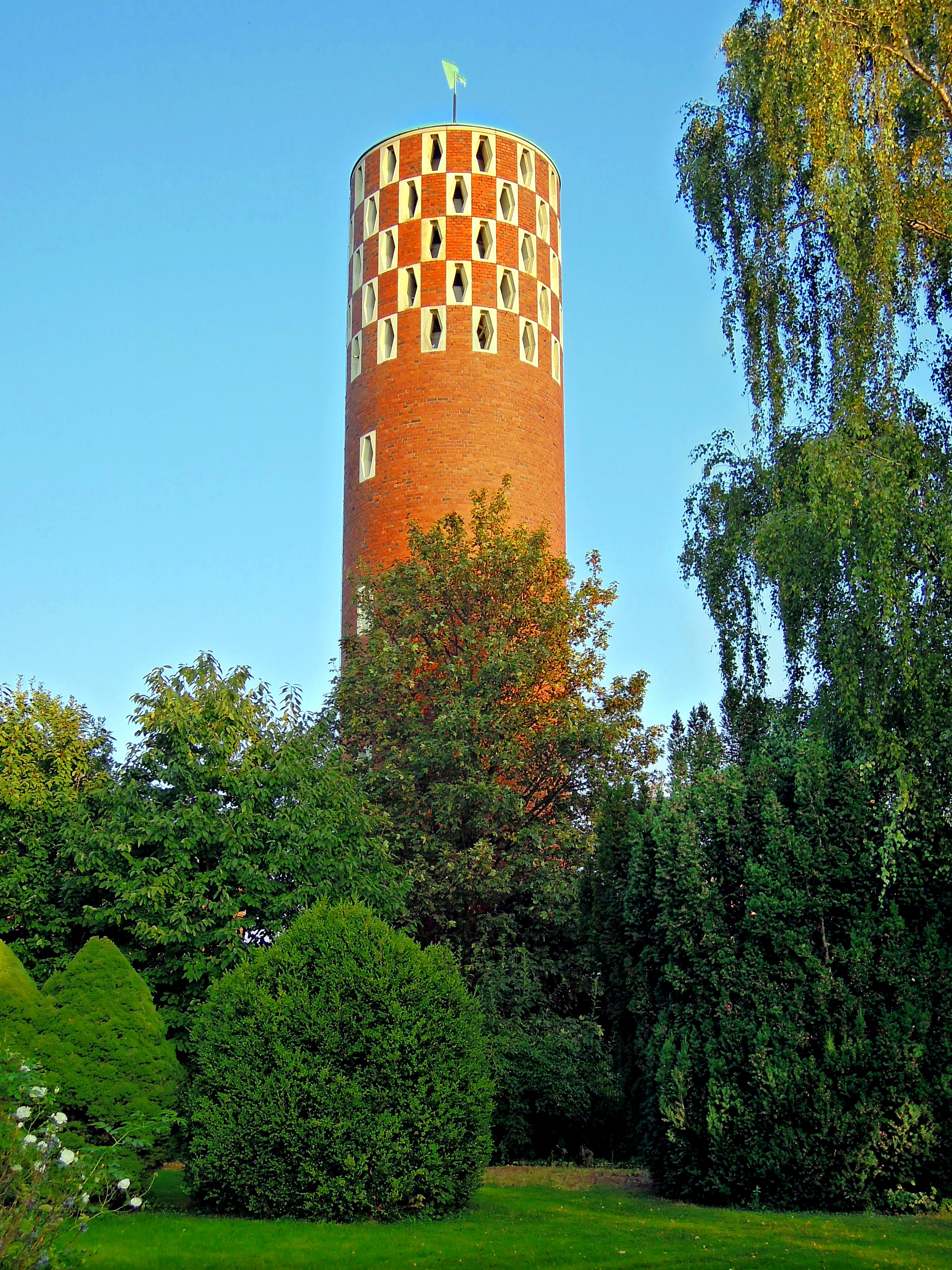 Kirchturm in Setterich